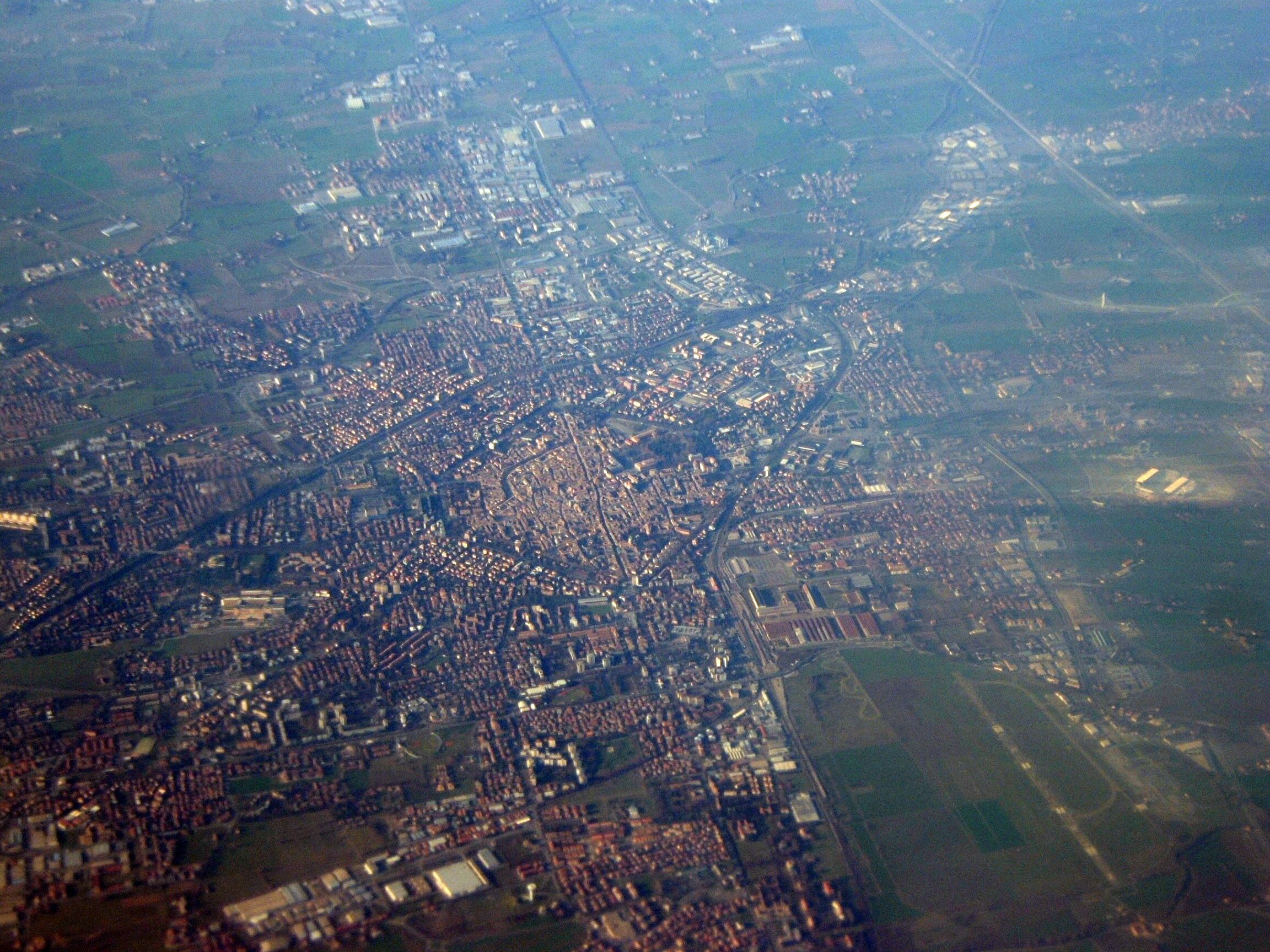 Aerial view of Reggio nell'Emilia, Italy